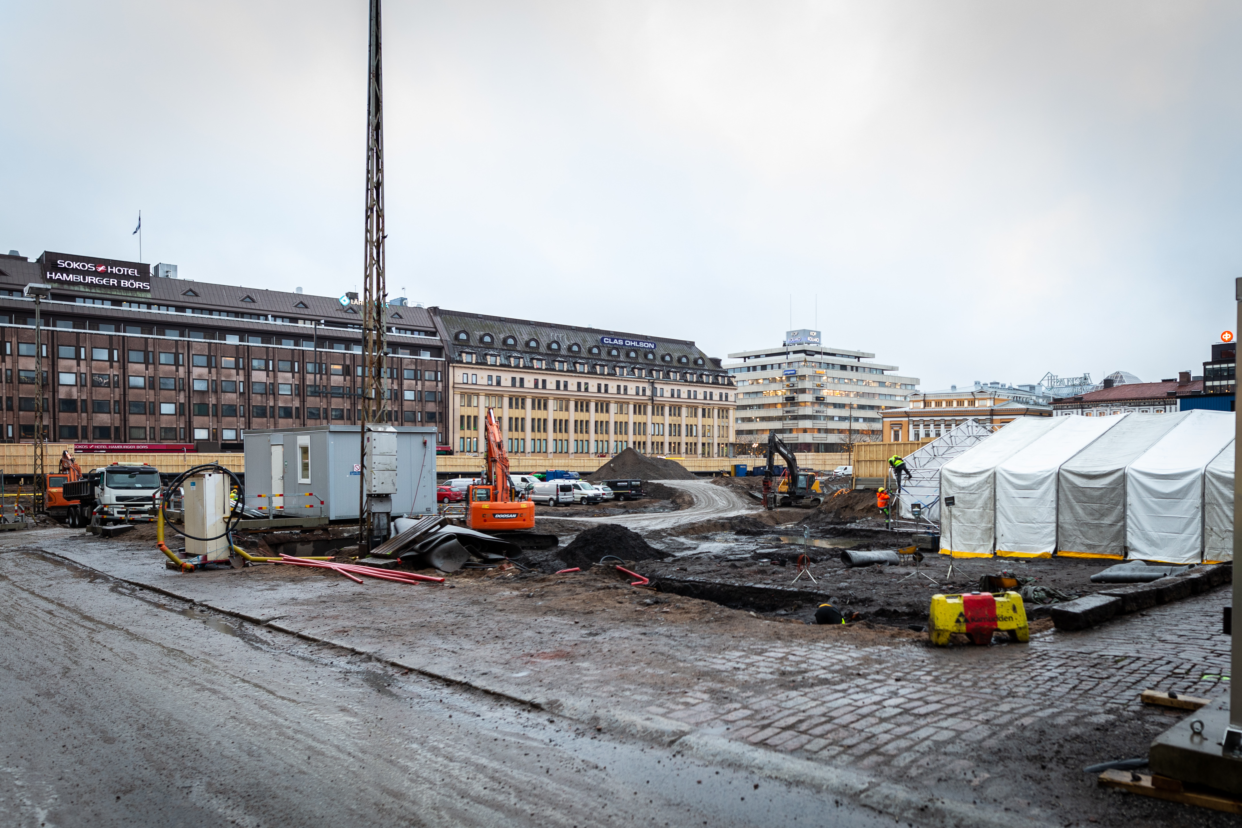 Turun toriparkin työmaa joulukuussa 2018.